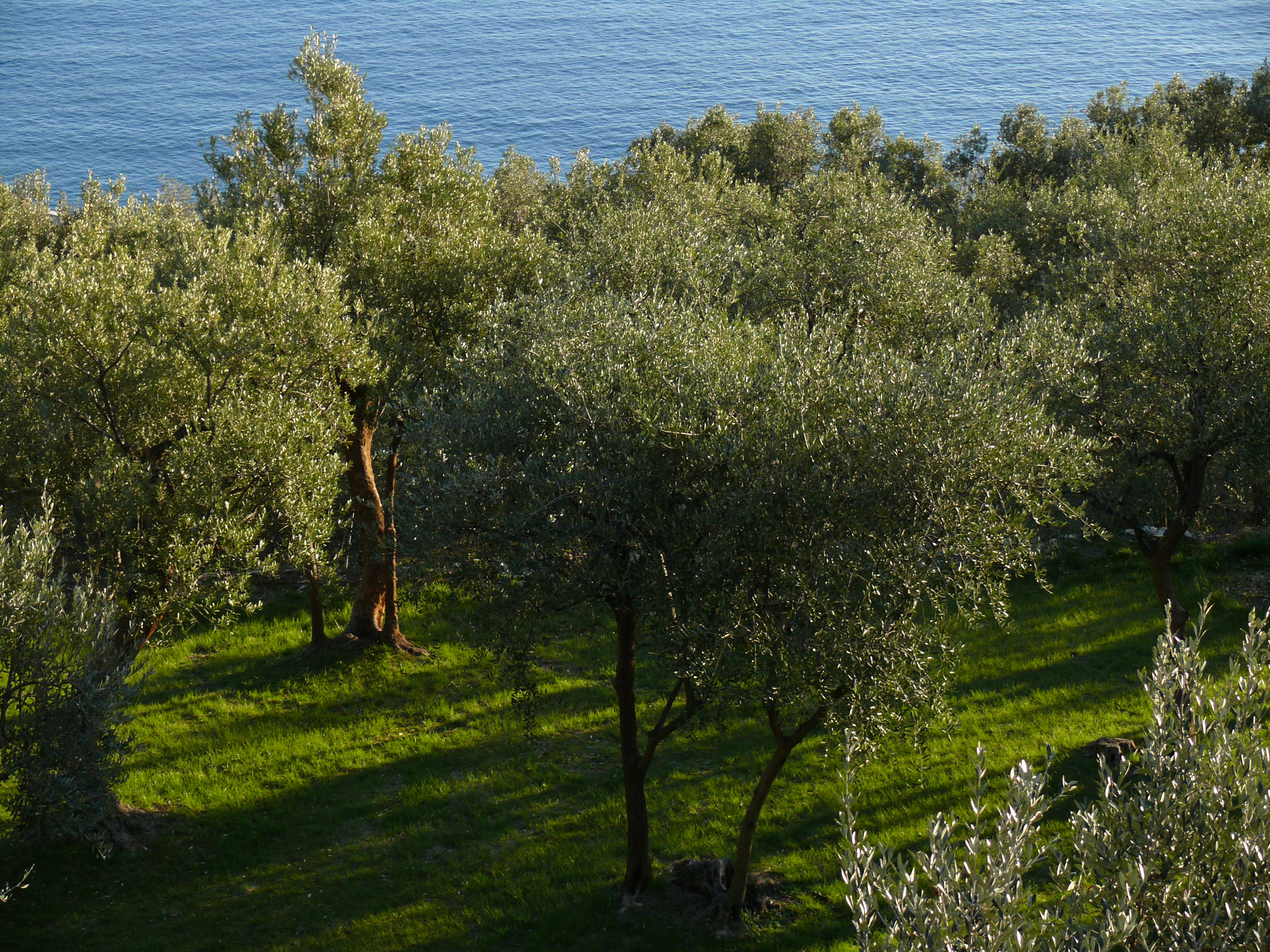 Olivi nella provincia di Genova in Liguria.